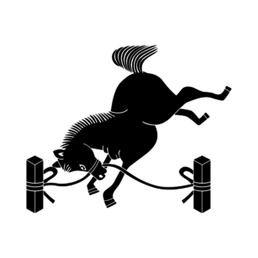 相馬氏の家紋